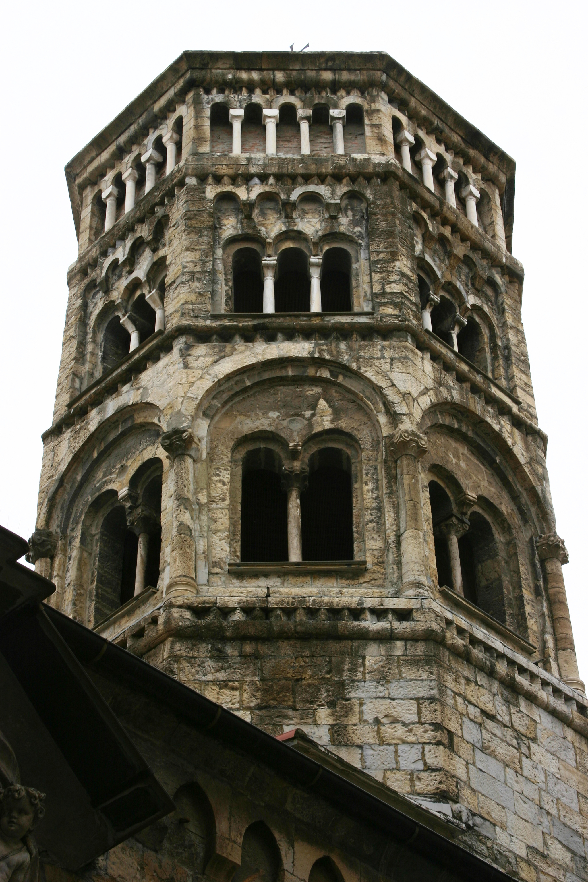 Igreja de San Donato - Gênova